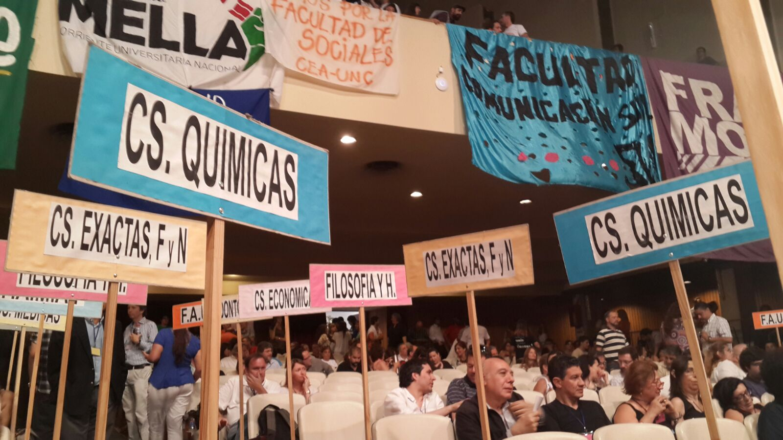 Desde el 12 de diciembre de 2015 la Universidad Nacional de Córdoba cuenta con 15 Facultades. Ese día se aprobó la creación de las Facultades de Ciencias de la Comunicación y Ciencias Socialesl